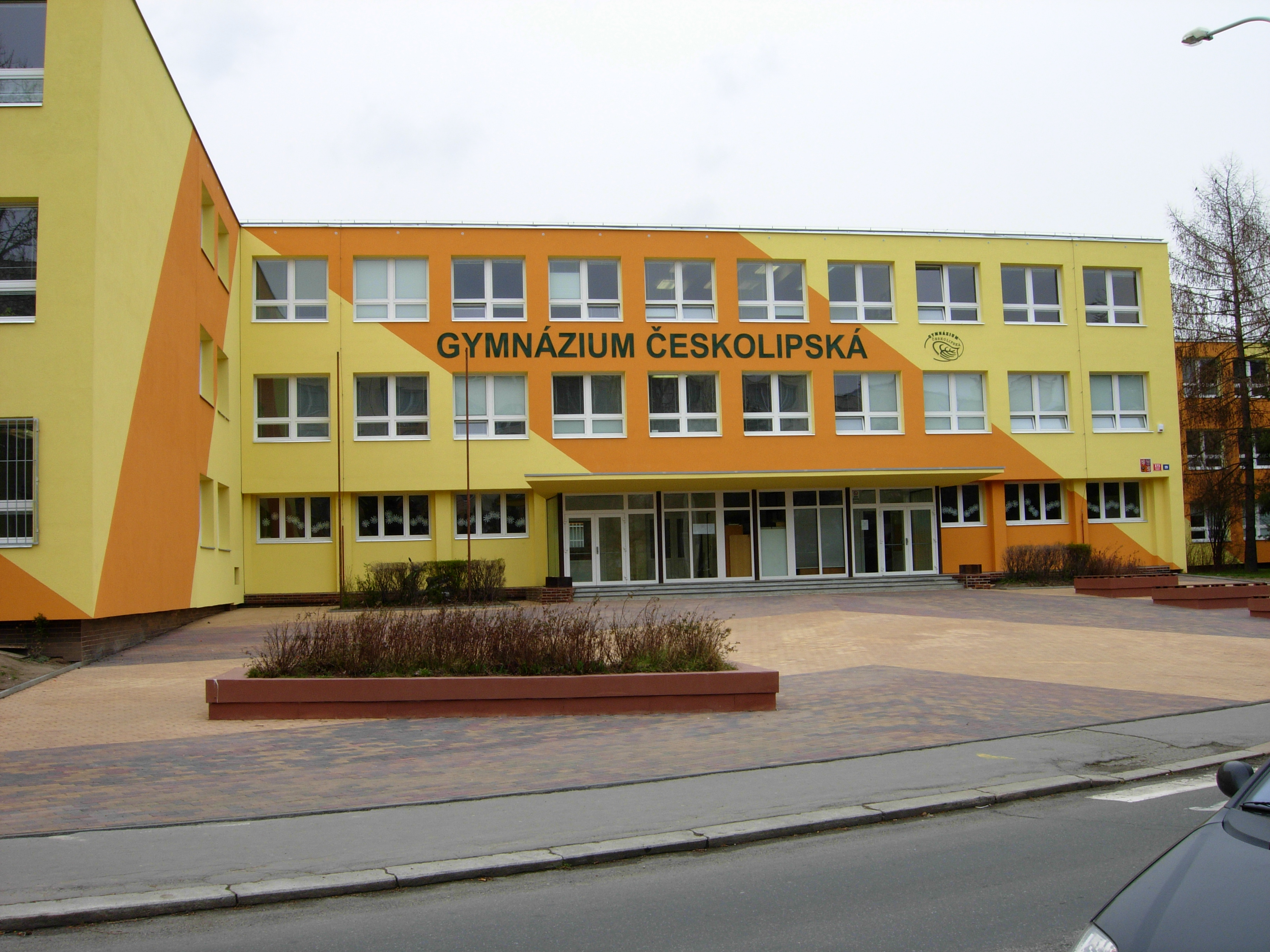 Gymnázium Českolipská v Praze na sídlišti Prosek, na adrese: Českolipská 373/27, Praha 9 - Střížkov.